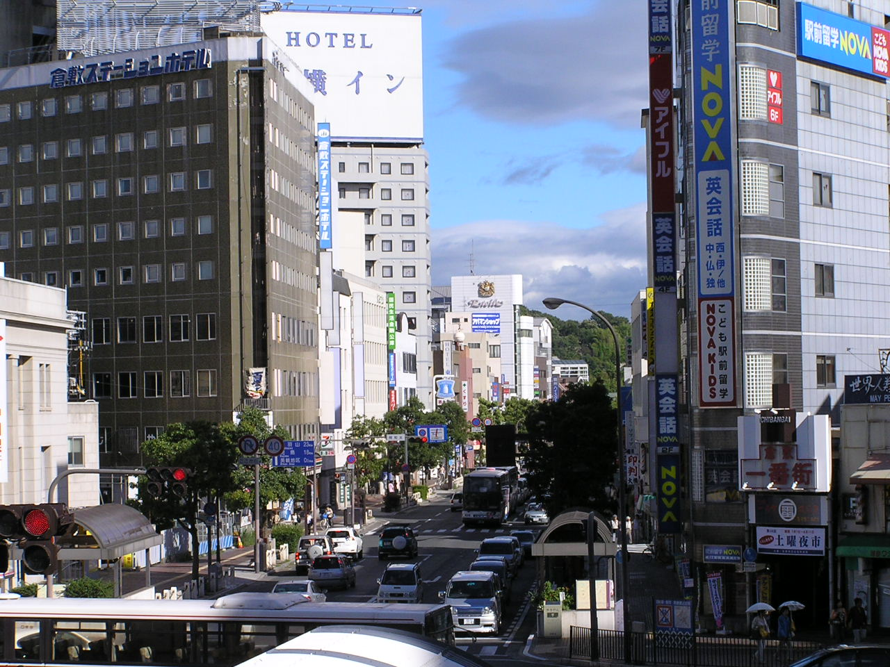 kurashiki city main street 1